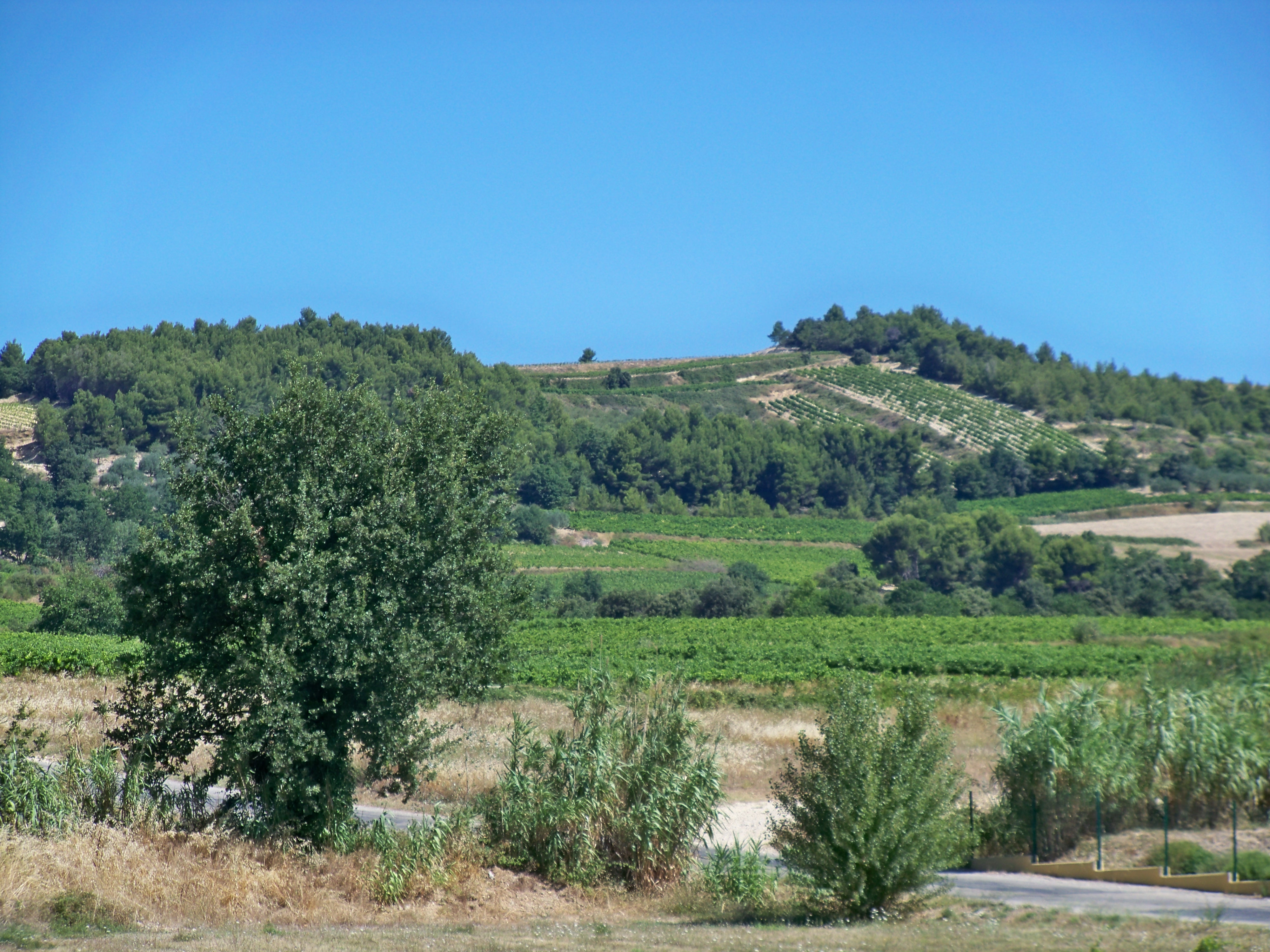 Coteaux de Saint Maurice sur Eygues, et ses vignes, Drôme, France